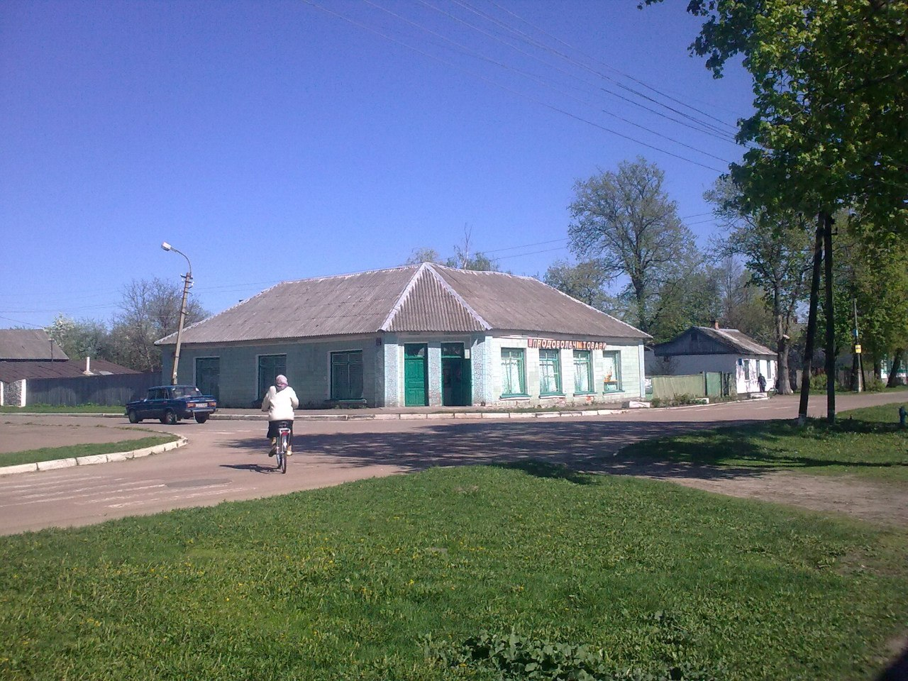 Центр Добрянки